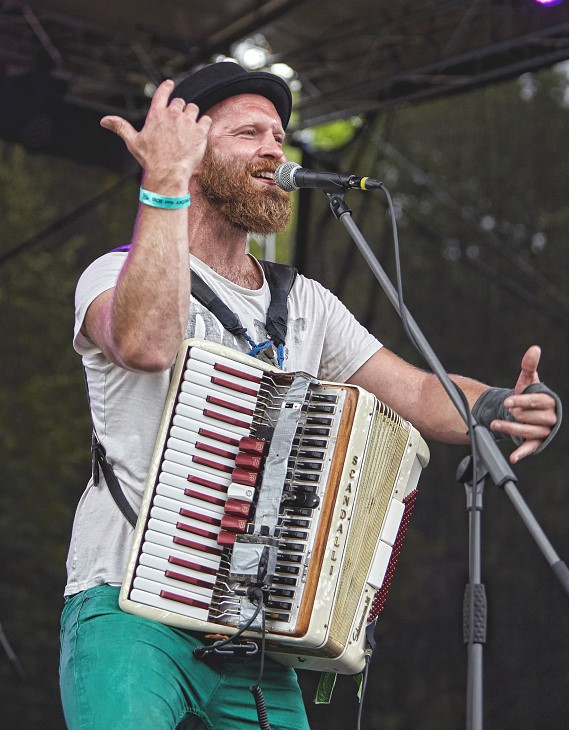 Jerky